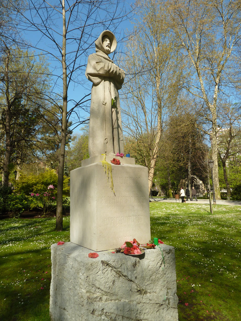 Oviedo